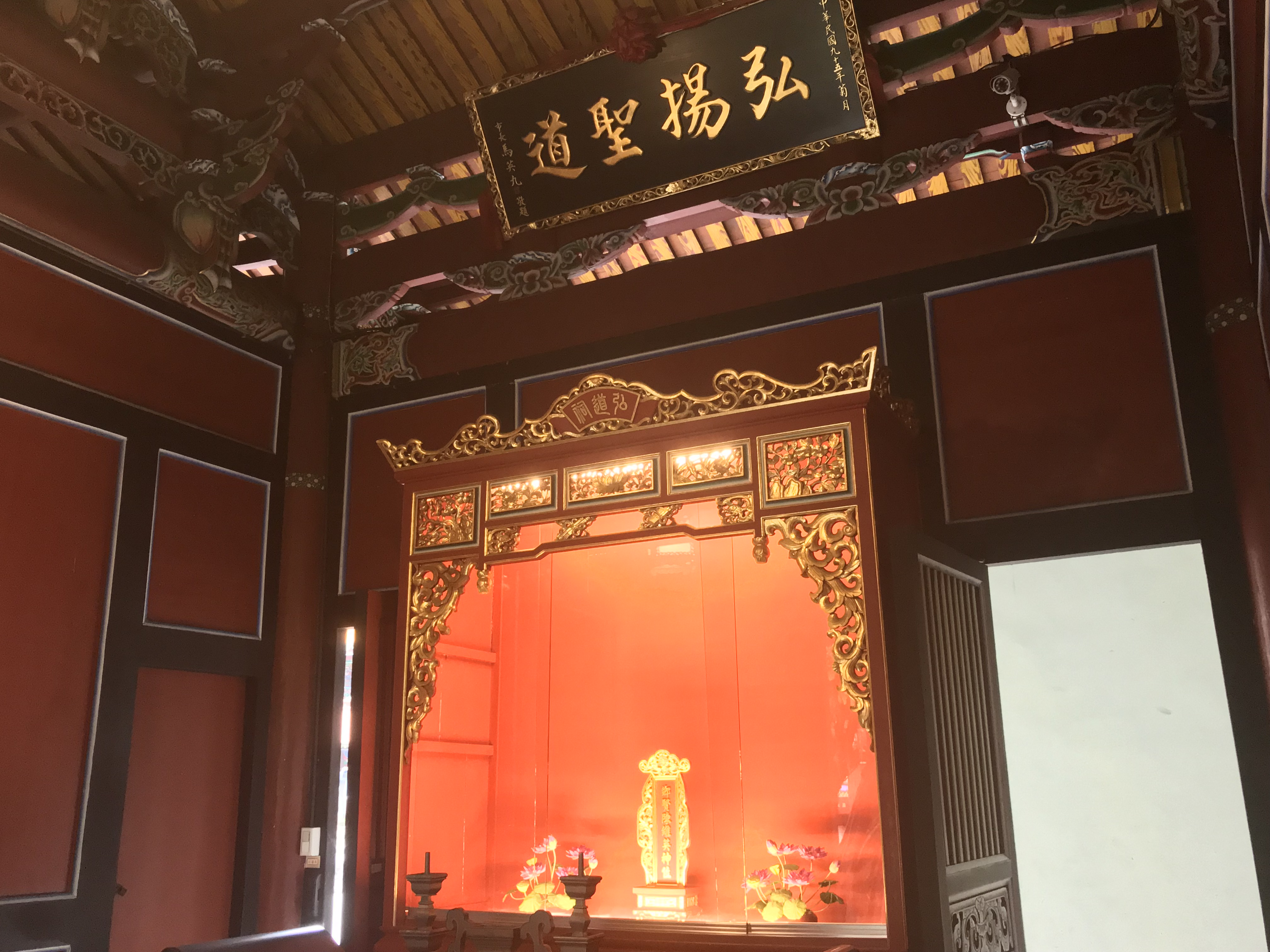 臺北孔子廟弘道祠內